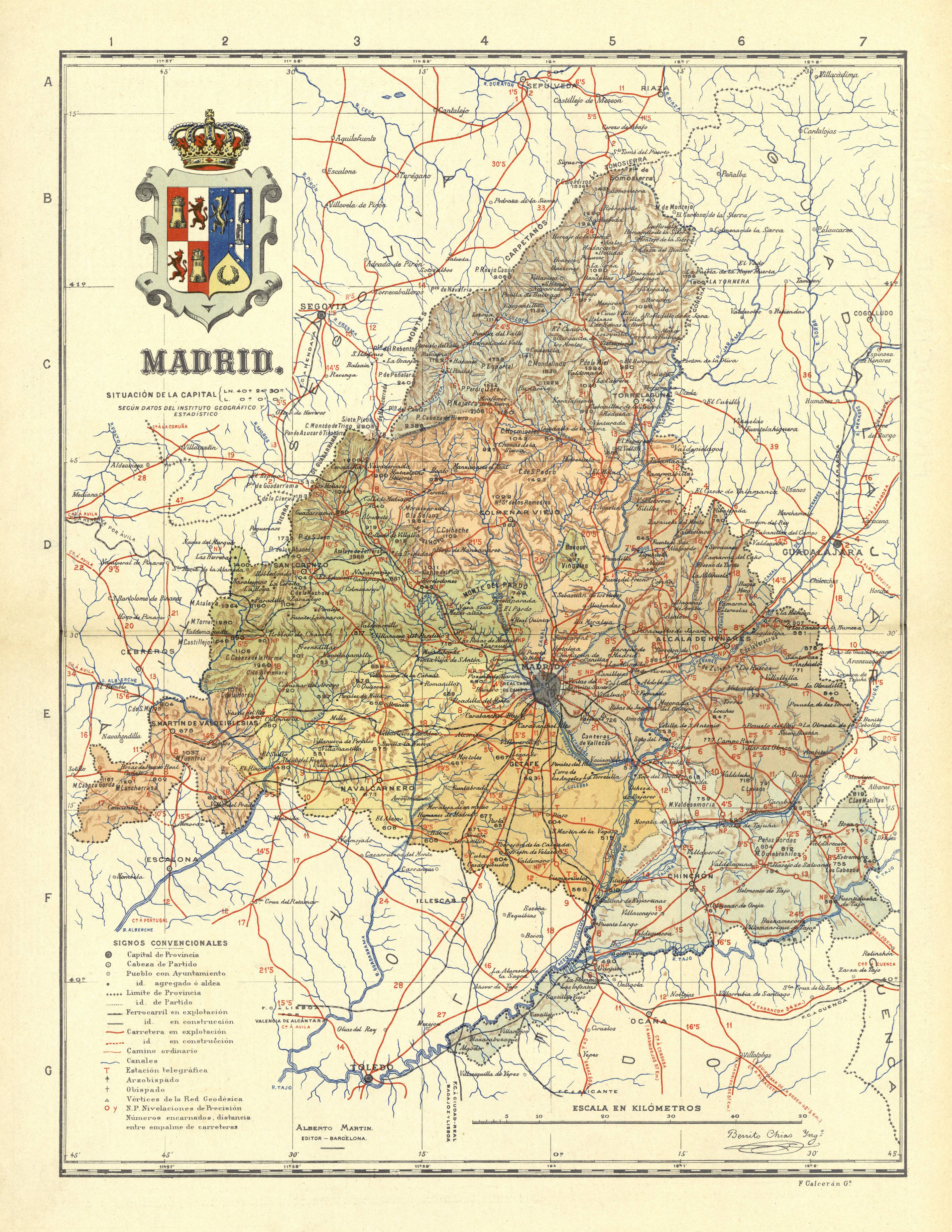 Mapa de la Provincia de Madrid (España). Publicado por Benito Chias Carbó (1874-1925) en 1909.